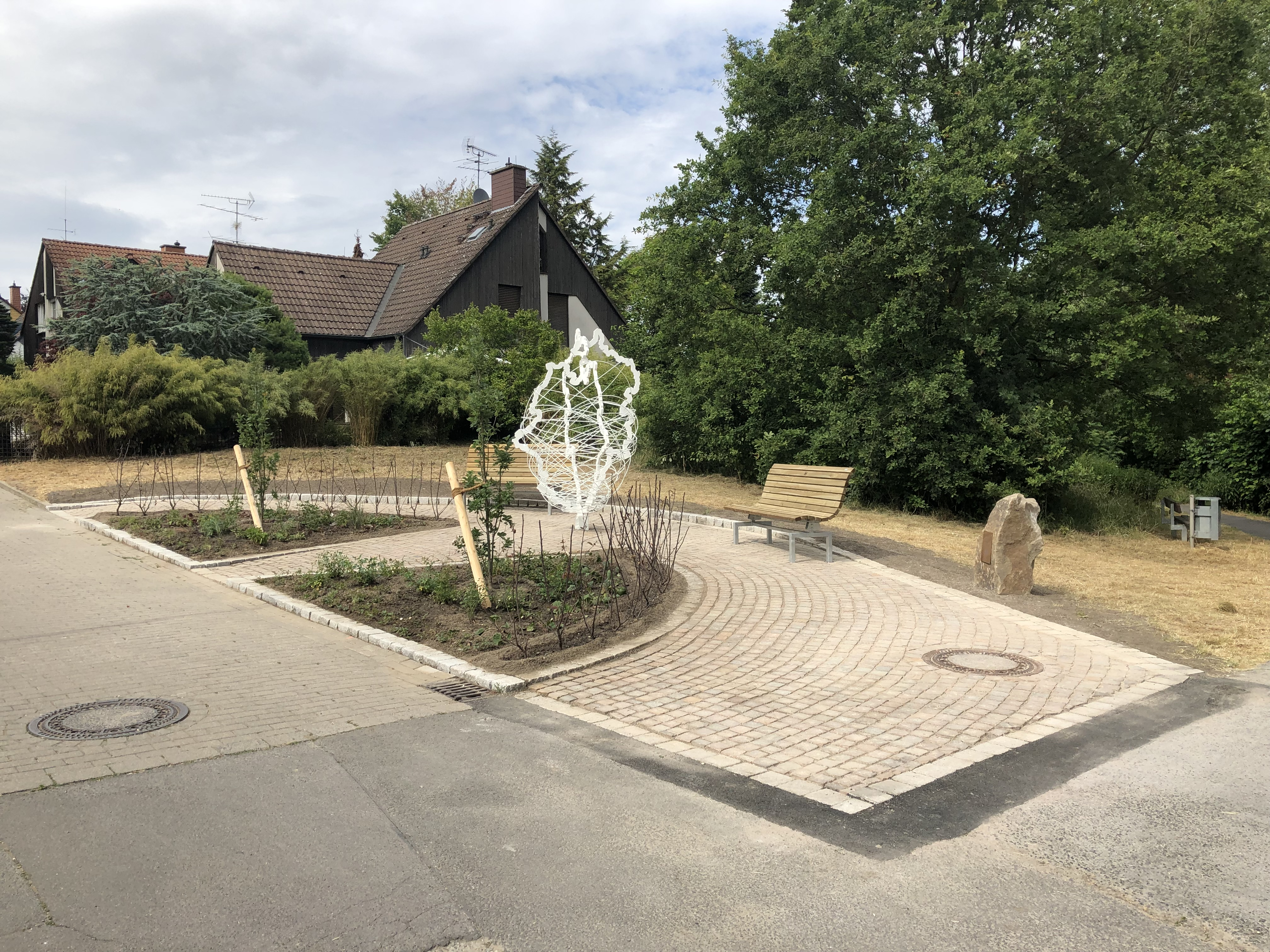 Mittelpunkt von NRW am Tage der offiziellen Einweihung. Die Skulptur der Künstlerin Christine Böse zeigt den zweifachen Umriss des Landes NRW umspannt von einem Kokon aus Stahldrähten.